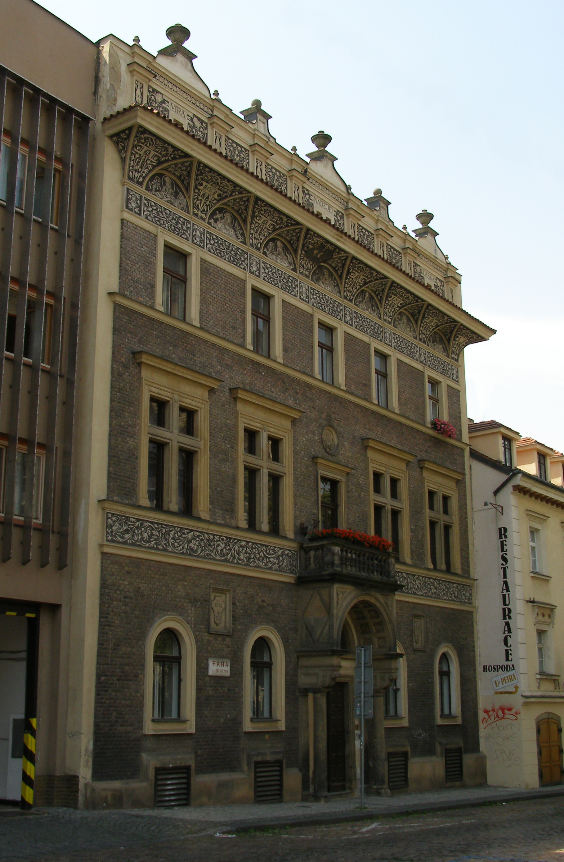 Fara (Nové Město), Praha 1, Biskupská 1137/13, Nové Město